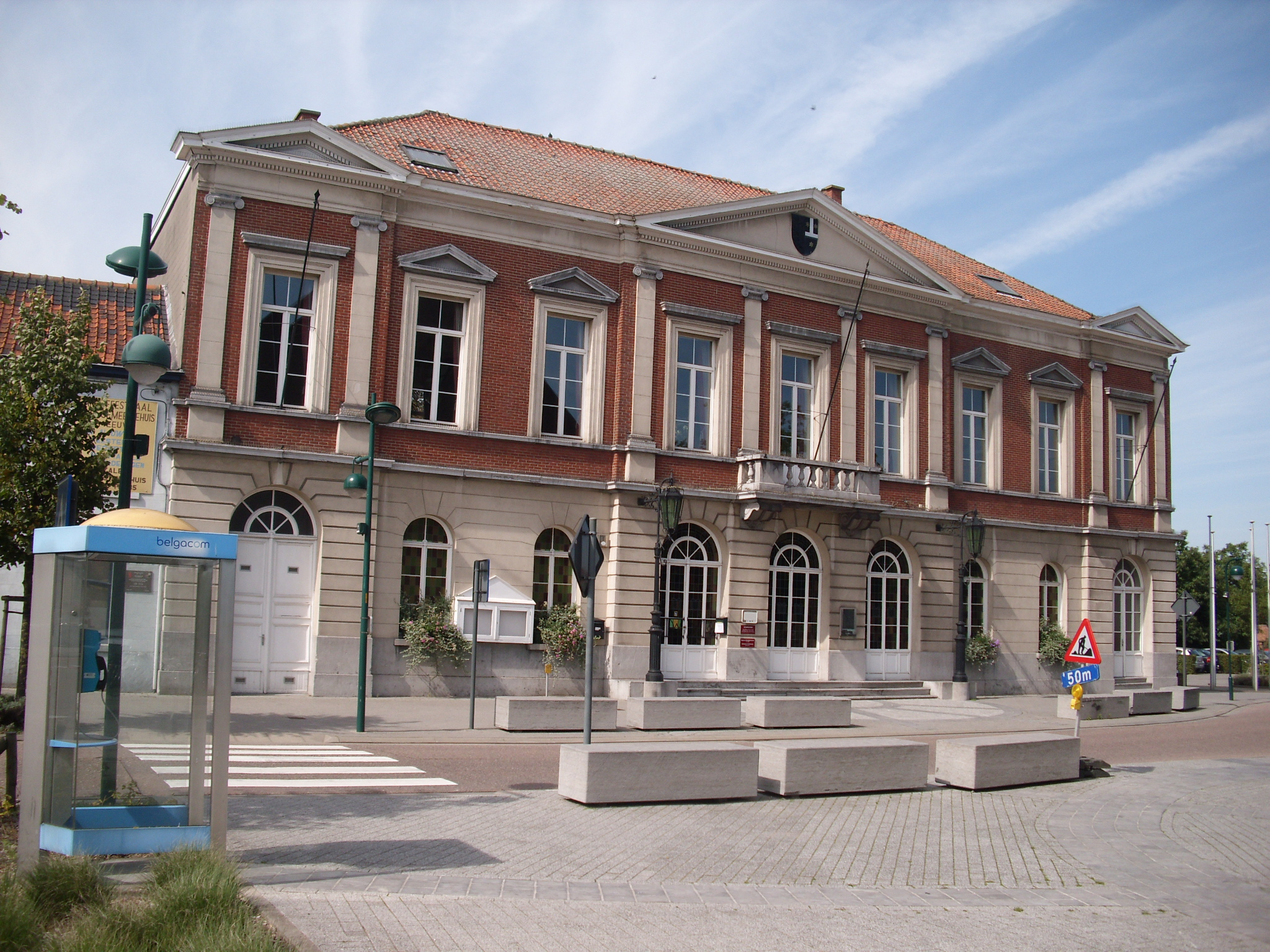 Oud gemeentehuis van Ertvelde - Evergem - Oost-Vlaanderen - Vlaanderen - België